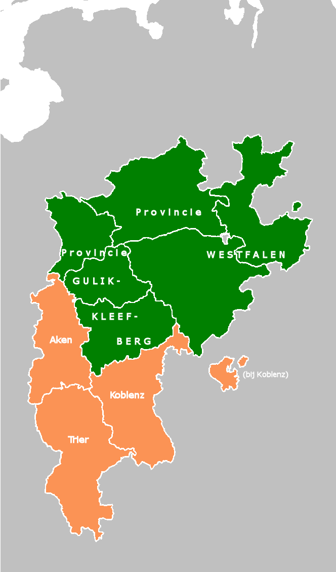 Provincie Groothertogdom Beneden-Rijn in 1818